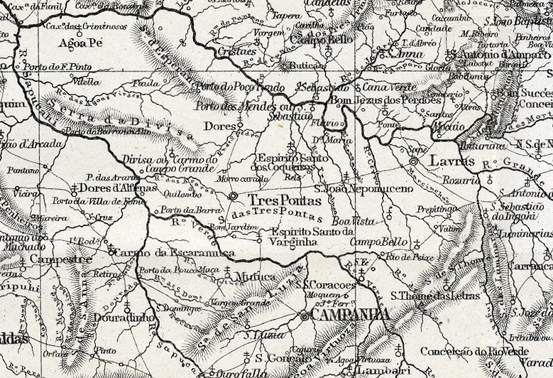 Recorte do mapa de Minas Gerais produzido em 1865 (Disponível em File:Minas_Geraes._Gotha,_1865.jpg) com destaque para a Três Pontas e seus arredores, mostrando as principais localidades existentes na época.